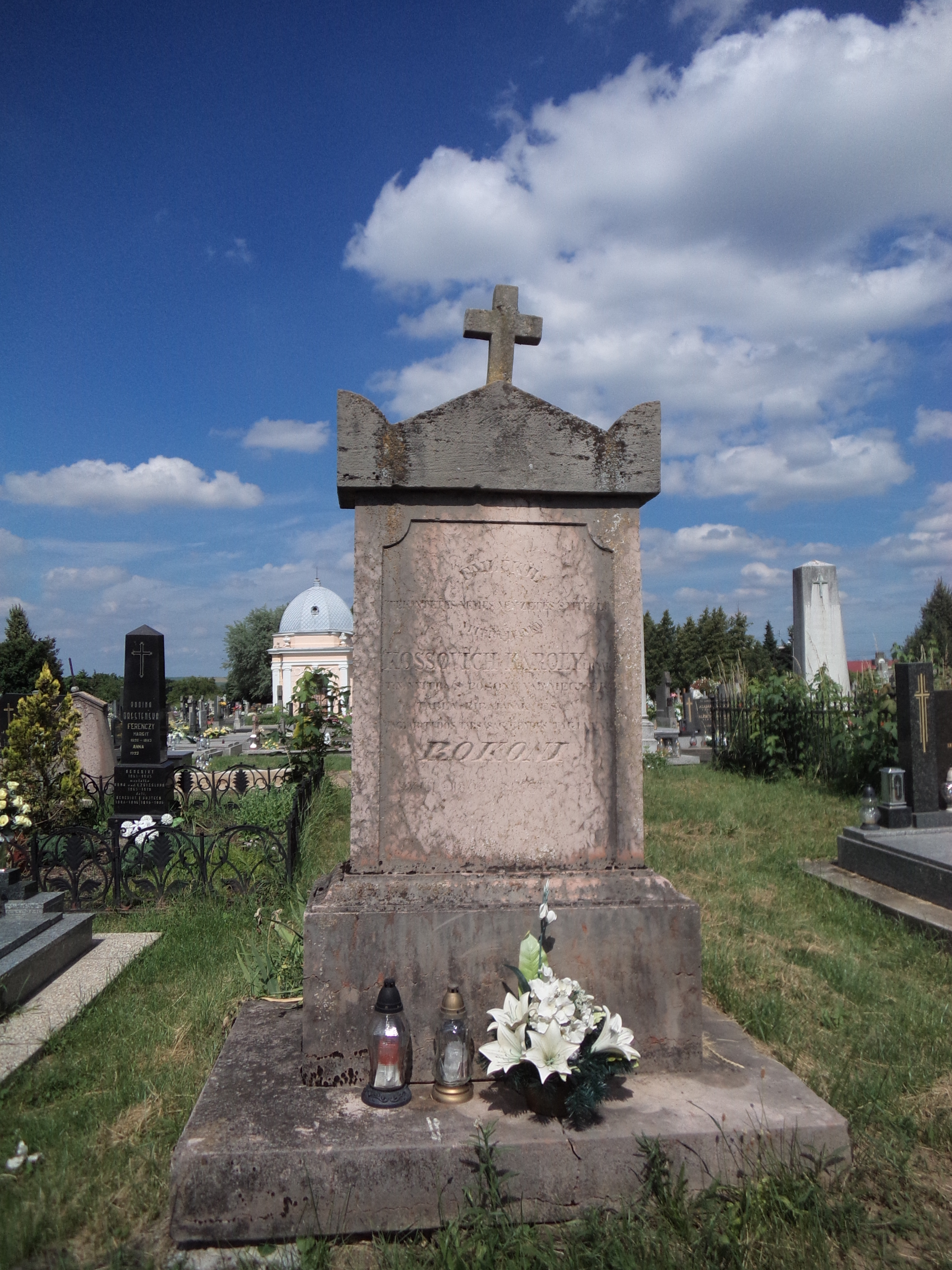 Nyitraivánka 2016 Kossovich Károly